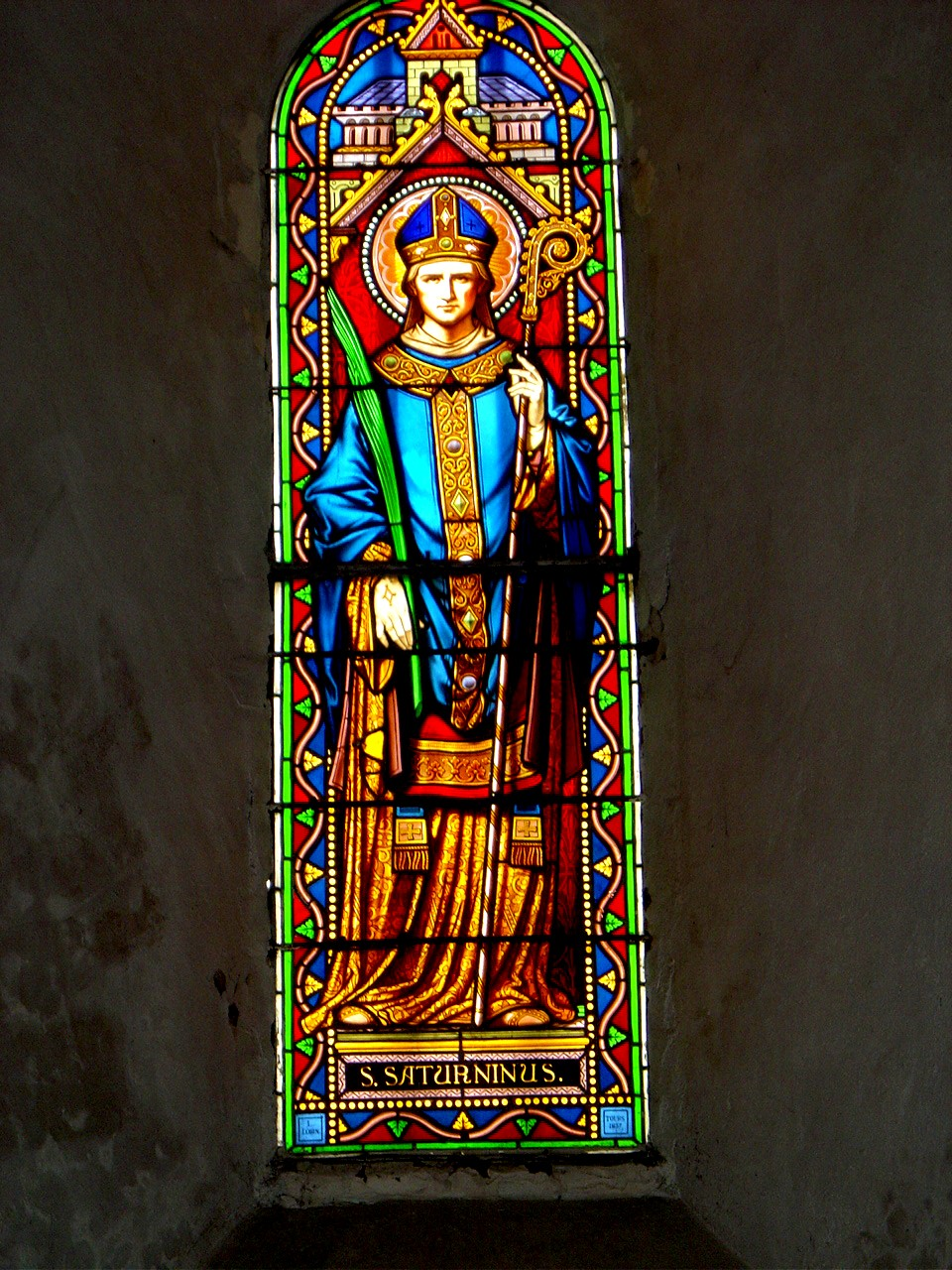 Vitrail Saint Saturnin - Eglise de Limeray - Indre et Loire - France